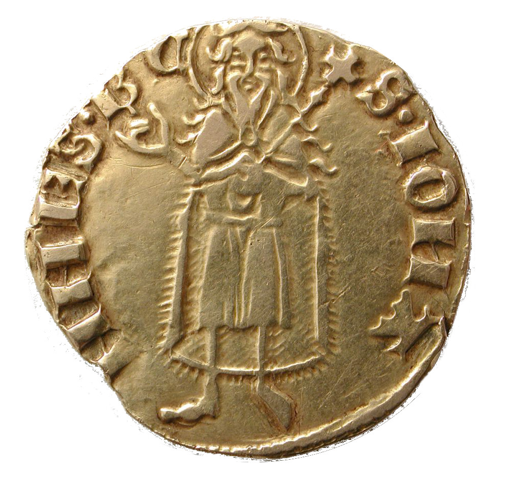 Florín aragonés de oro de Pedro IV de Aragón, acuñado en Zaragoza entre 1369 y 1372. Anverso